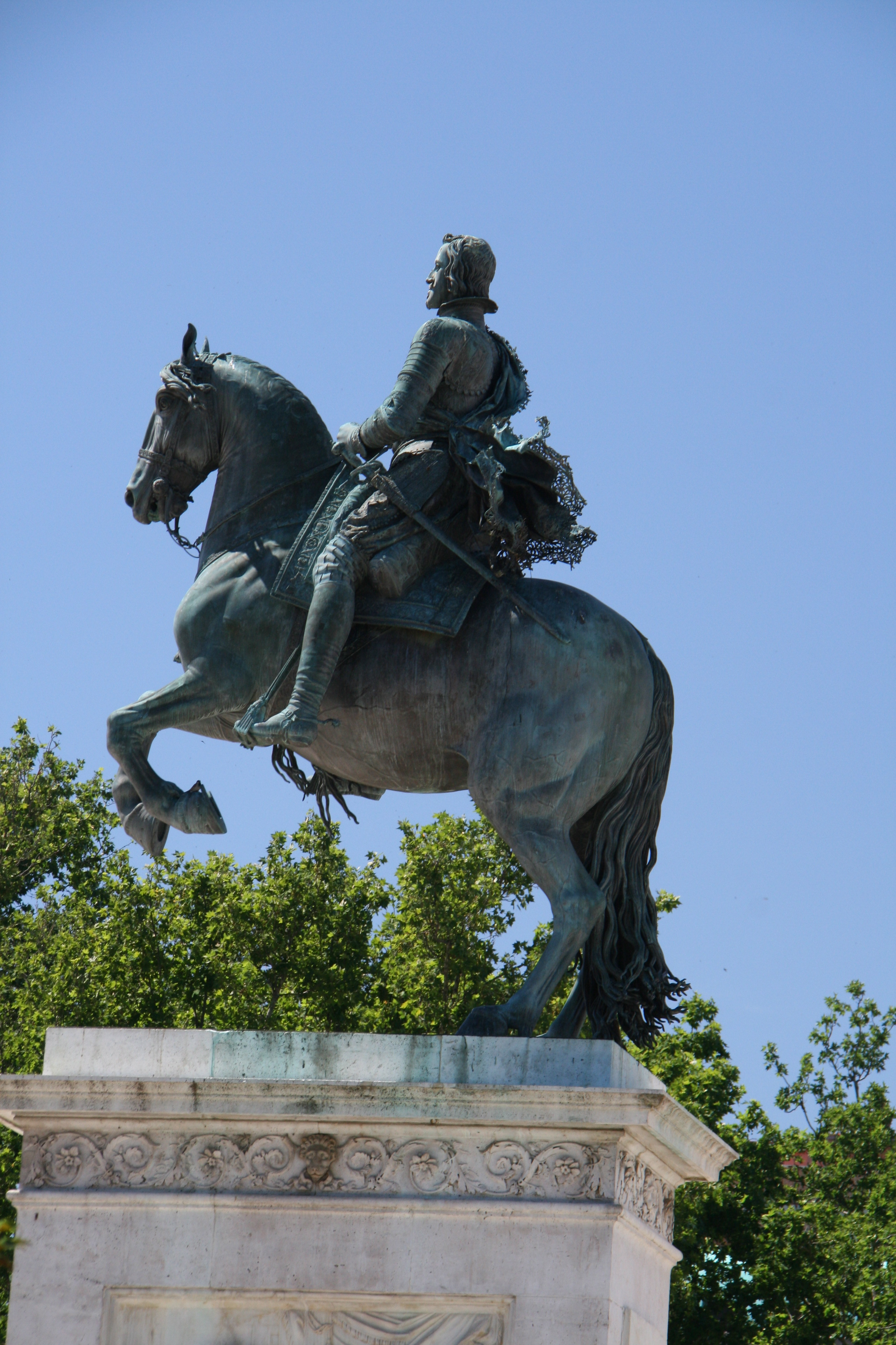 Ecuestre de Felipe IV